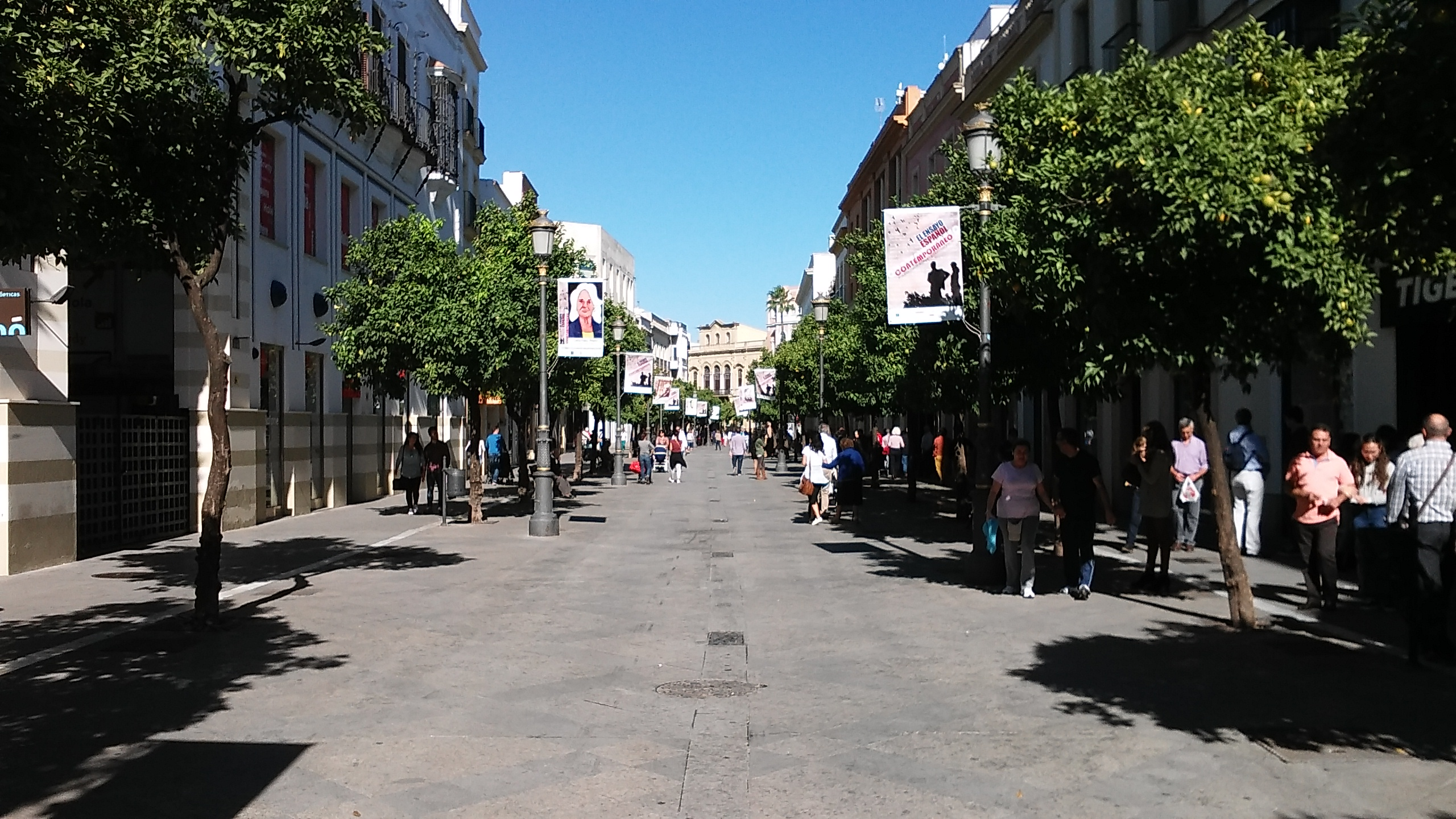 Calle Larga engalanada con motivo de la XVII Congreso de la Fundación Caballero Bonarld